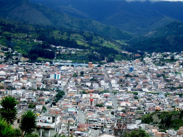 Vista general del centro de la ciudad de Loja, Ecuador.